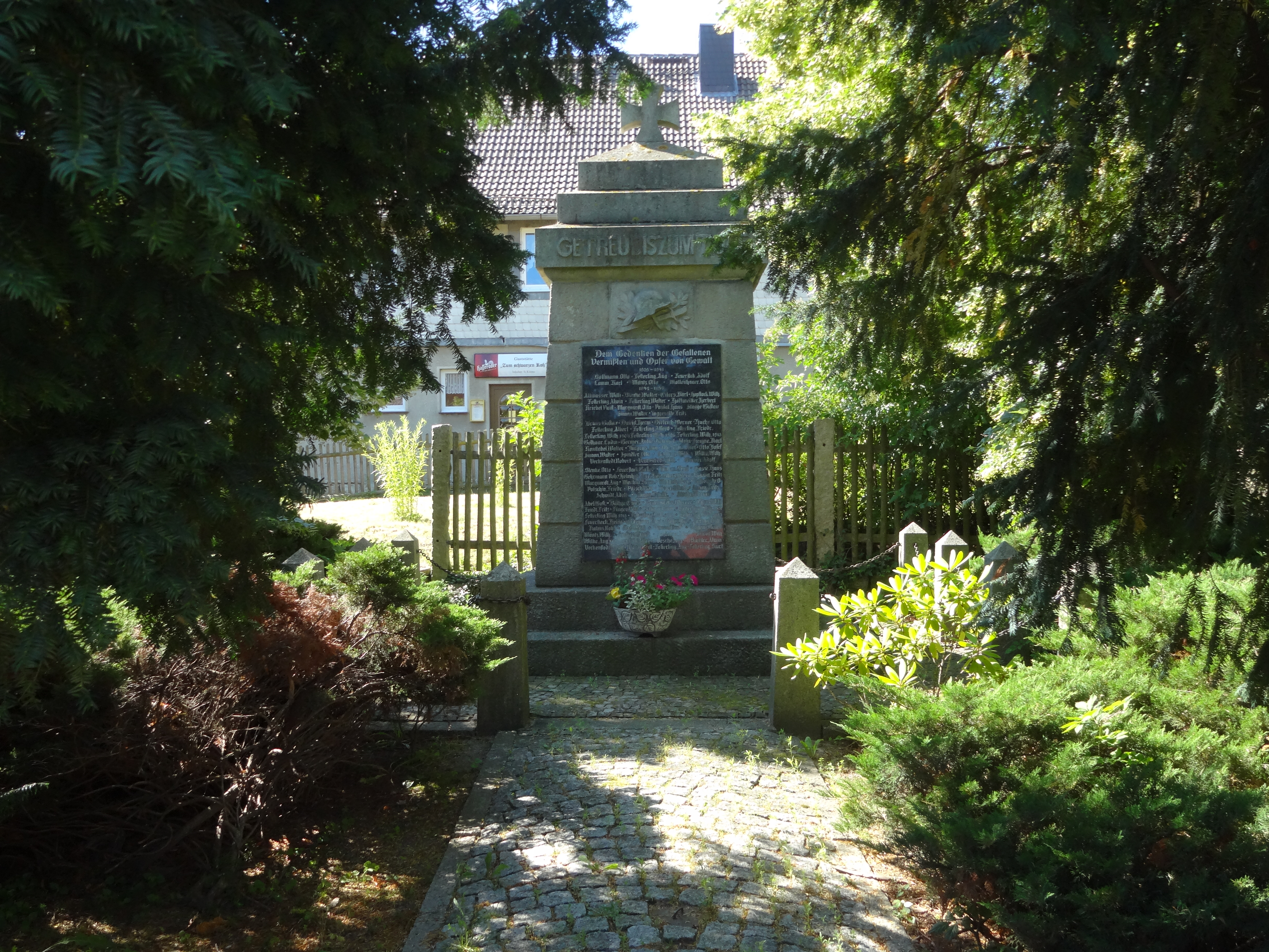 denkmalgeschütztes Kriegerdenkmal für die Gefallenen des Ersten Weltkriegs an der Weggabelung Burgstraße/Hauptstraße in Langeln, Gemeinde Nordharz